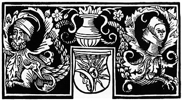 "Літара П". Песни Царя Давыда еже словуть Псалтыръ. Прага, 1517. Л.5. 84Х45 мм. Тэхніка ксілаграфіі. Белая рыска на чорным фоне.